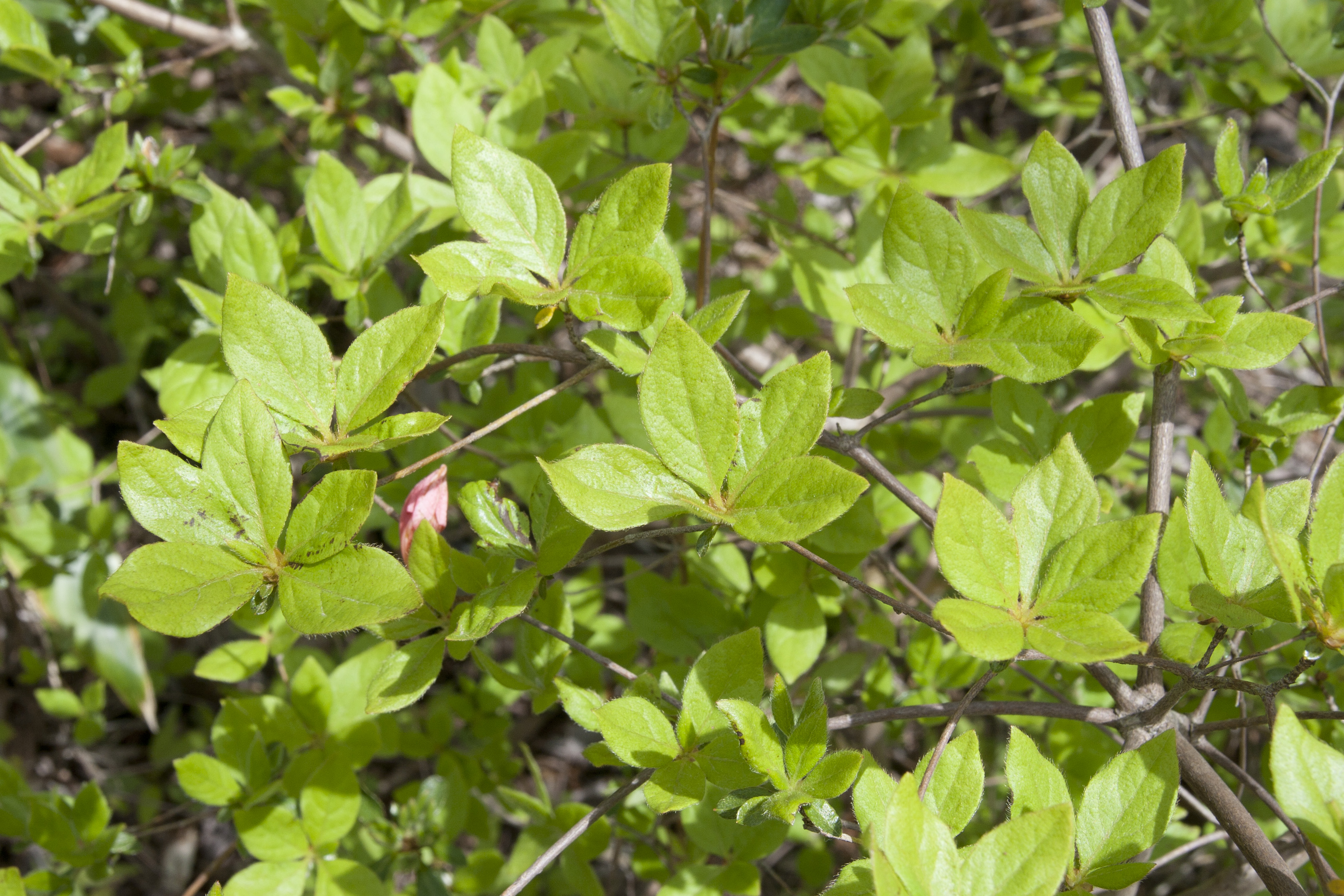 ヤマツツジ (学名:Rhododendron kaempferi)